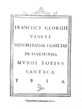 Page de titre de l'ouvrage de Francesco Giorgio (Francesco Zorzi) De Harmonia Mundi totius, cantica tria (pub. Venise 1525)